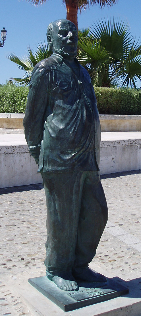 Estatua del escritor Fernando Quiñones en Cádiz, España.